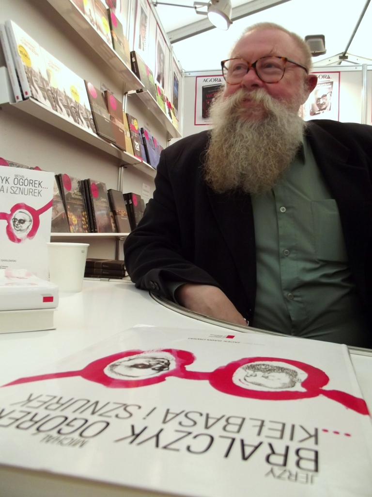 Jerzy Bralczyk podczas 17. Targów Książki w Krakowie.